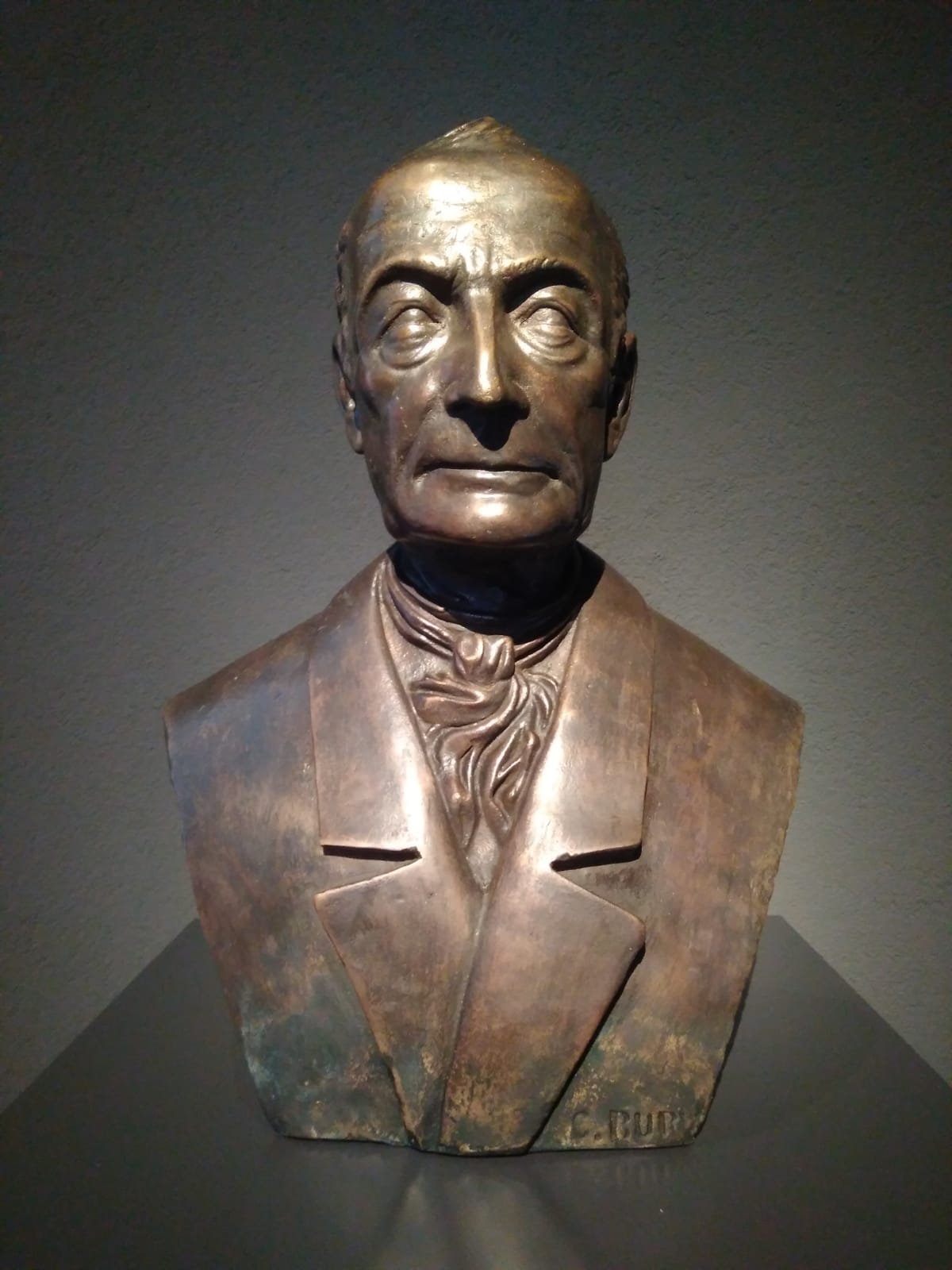 Bronzebüste Johann Georg Martin Dursch